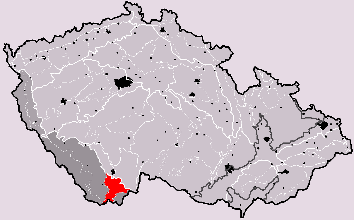 Poloha geomorfologického celku Novohradské podhůří v rámci České republiky. Hercynský systém Hercynská pohoří I Česká vysočina I1 (I) Šumavská subprovincie I1B (IB) Šumavská hornatina I1B-4 (IB-4) Novohradské podhůří